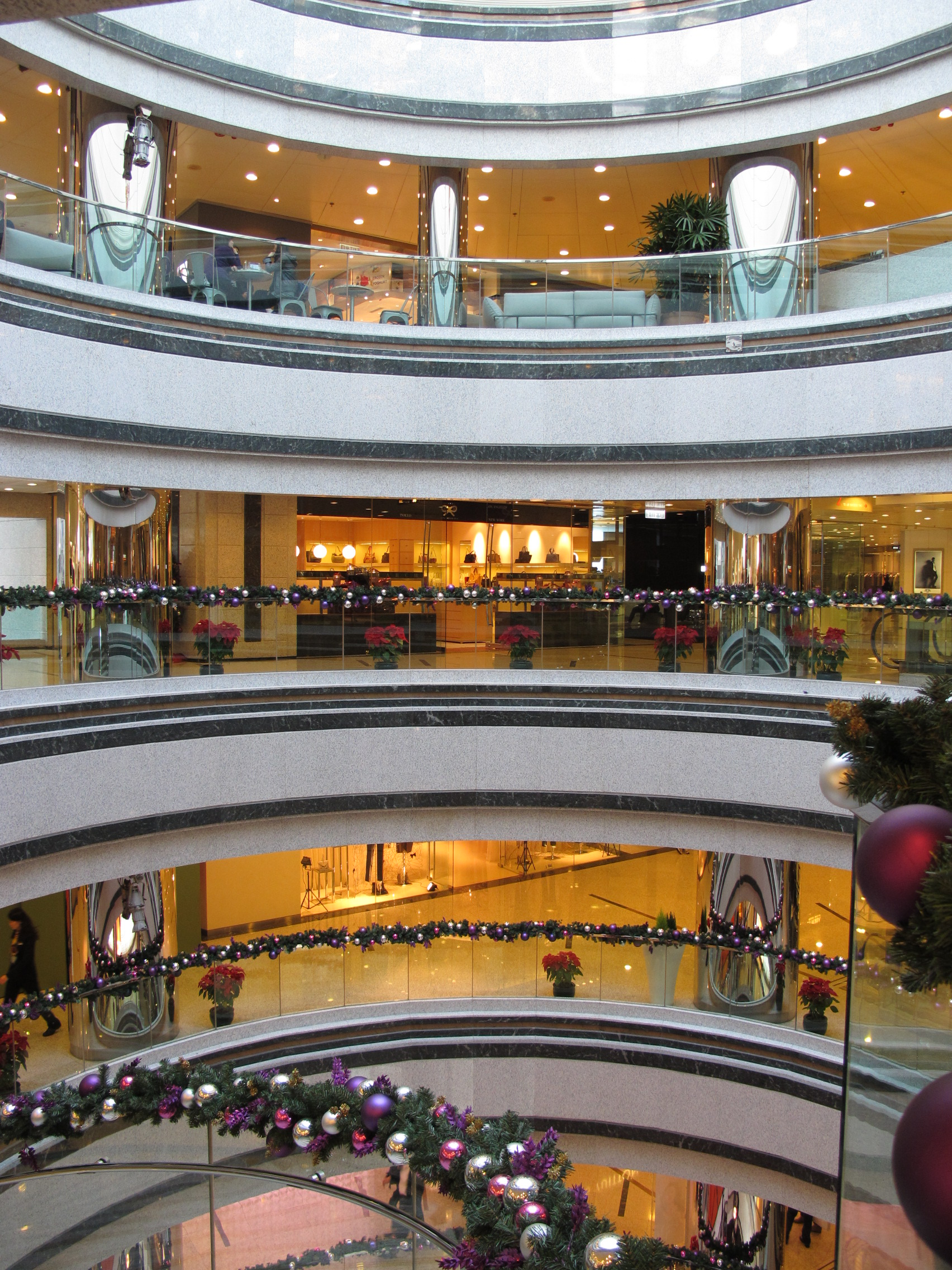 Lee Garden Atrium